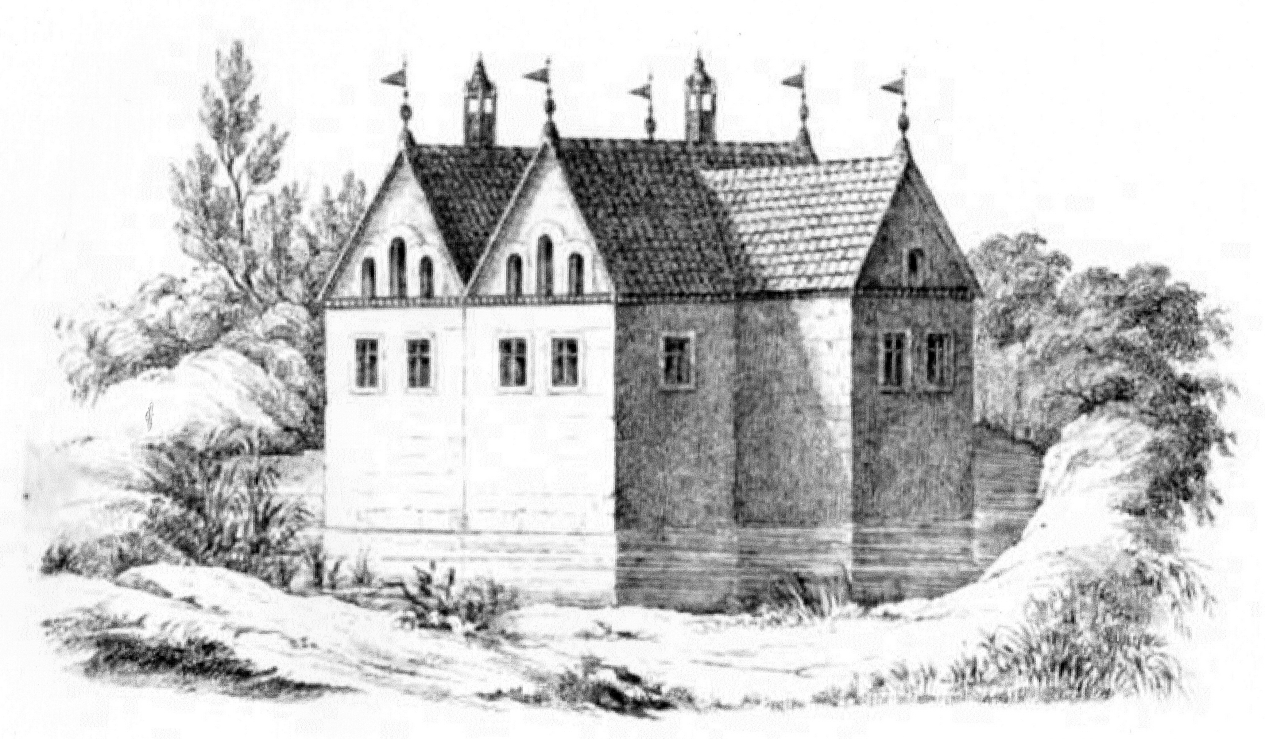 Das alte Herrenhaus Neverstorf, Zeichnung von Köhler und Roisternitz 1862